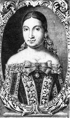 María de las Nieves Téllez-Girón, duquesa de Medinaceli, esposa de Luis Francisco de la Cerda